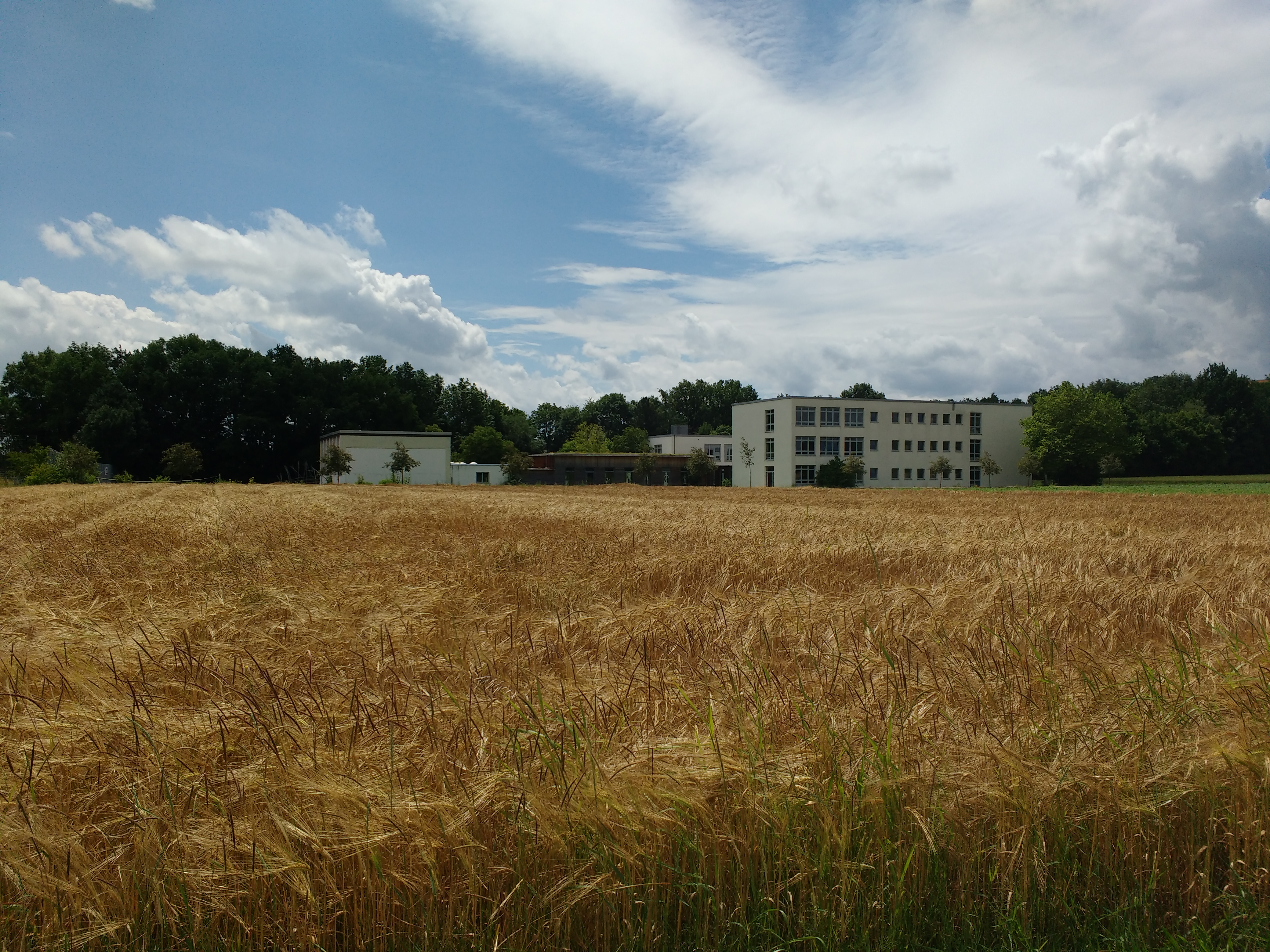 Grundschule Vötting (Freising)